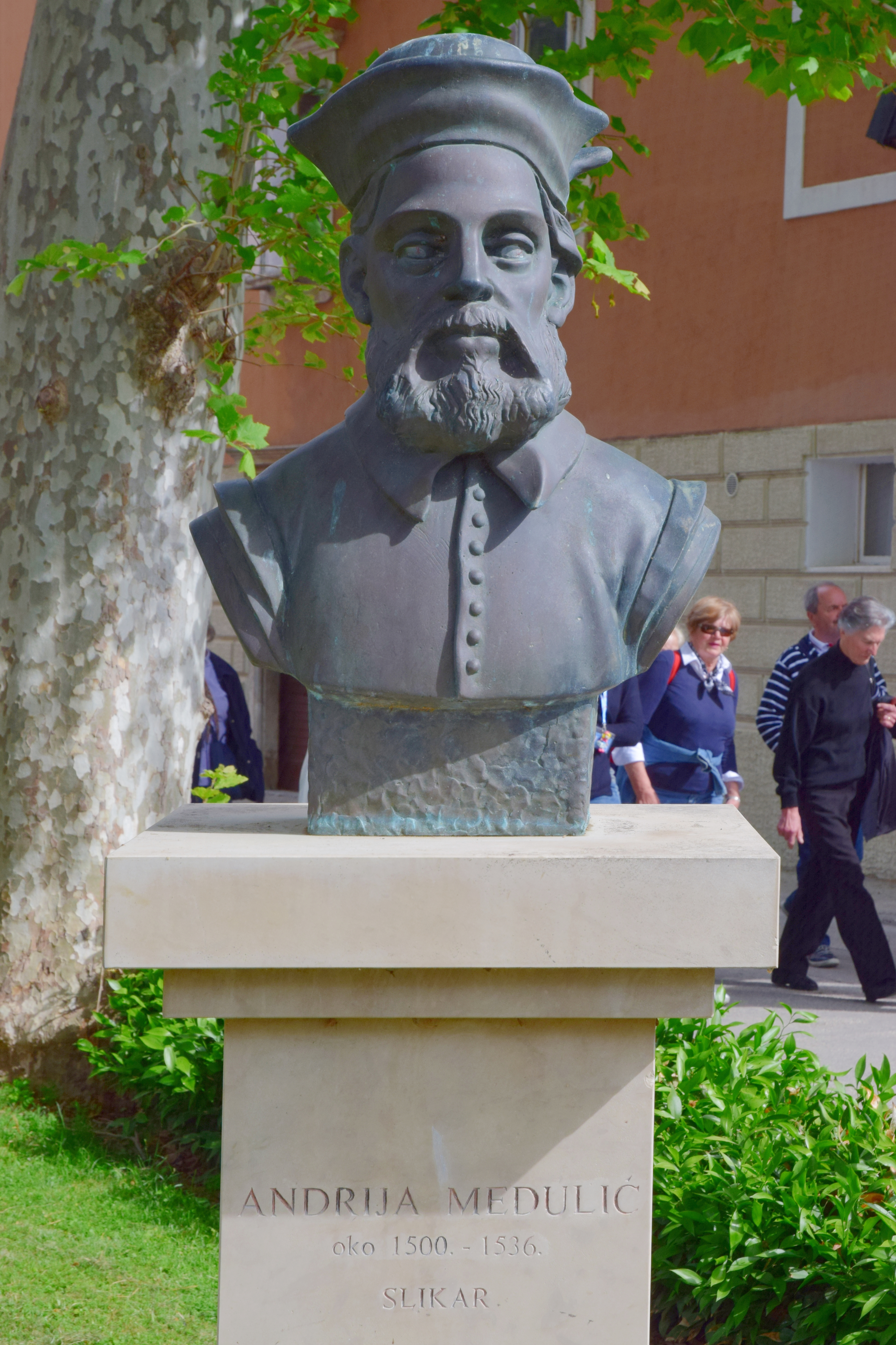 Büste des Malers Andrea Schiavone alias Andrija Medulic in Zadar